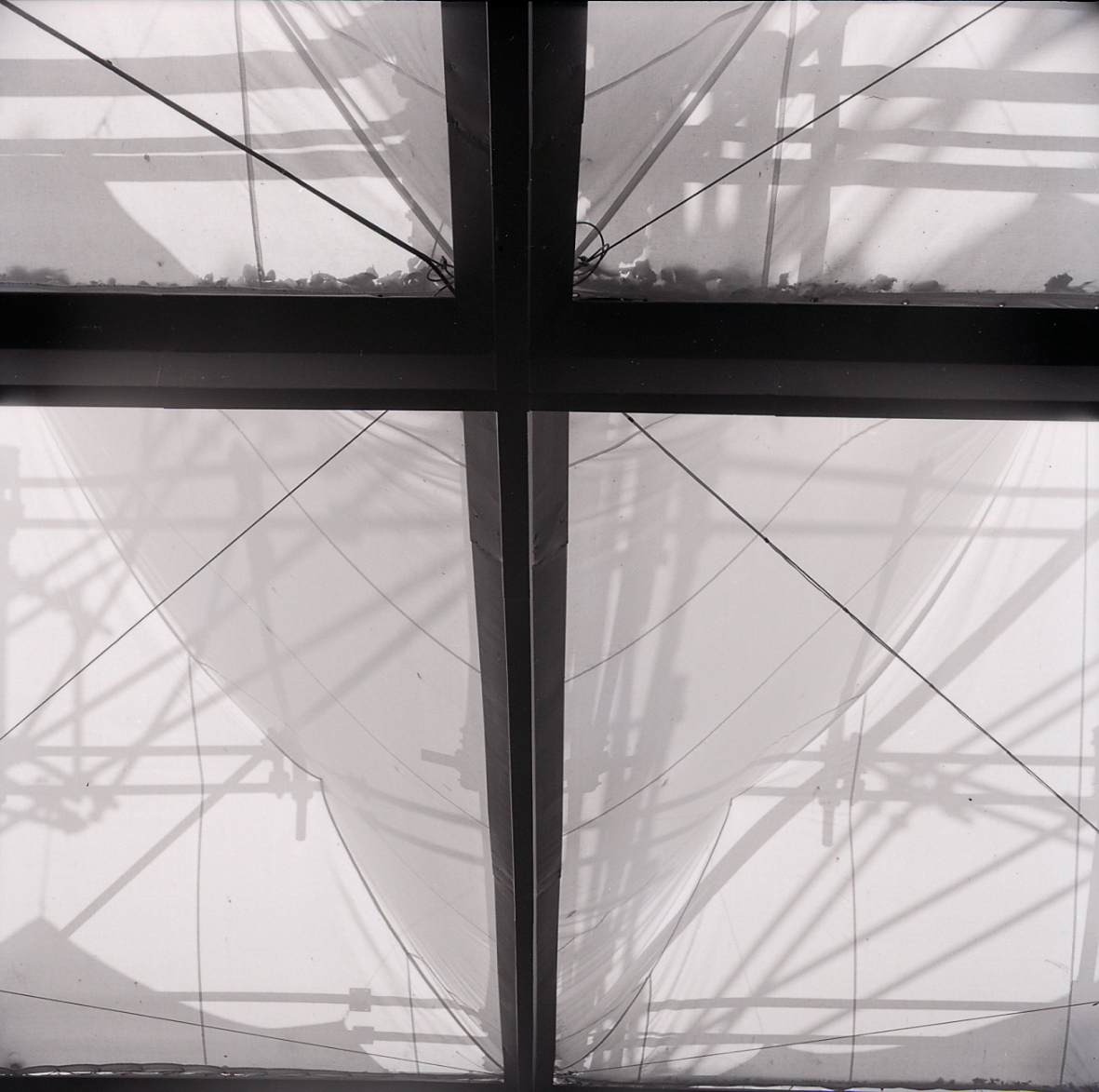 Servizio fotografico : Milano, 1954 / Paolo Monti. - Buste: 14, Fototipi: 14 : Negativo b/n, gelatina bromuro d'argento/ pellicola ; 6x6. - ((Serie costituita da 18 negativi identificati con i nn.: 23755-23757, 23760-23770. Numerazione parallela: 1309-1311, 1379-1388. Sulla busta R23755 manoscritto: "Arch. terzaghi/ X Triennale/ Pad. dei Fiori." Numerazione parallela: 1166-1171. La suddetta serie è contenuta nella scatola identificata con la numerazione 23214/23808. Sulla scatola manoscritto con pennarello nero: "Design e arte moderna". - Occasione: Documentazione della X Triennale del 1954, intitolata "Prefabbricazione - Industrial Design: Esposizione Internazionale delle Arti Decorative e Industriali Moderne e dell'Architettura Moderna". L'esposizione si tenne presso il Palazzo dell'Arte. - Fonte: Fattura di Paolo Monti: IV . Commesse/ Fattura n. 32/ Fotografie d'archivio per volume sulla Triennale di Milano (1977/11/28), presso Archivio Paolo Monti. n. 15 fotografie decime Triennale di Milano 1954